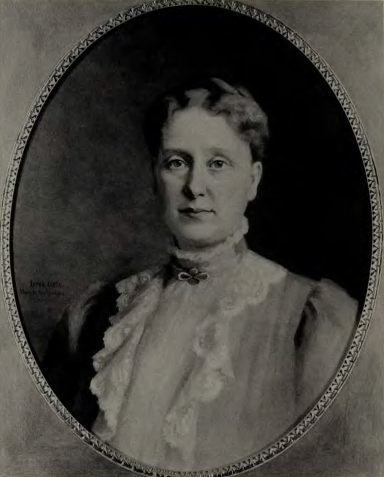 12 pages 26 cm